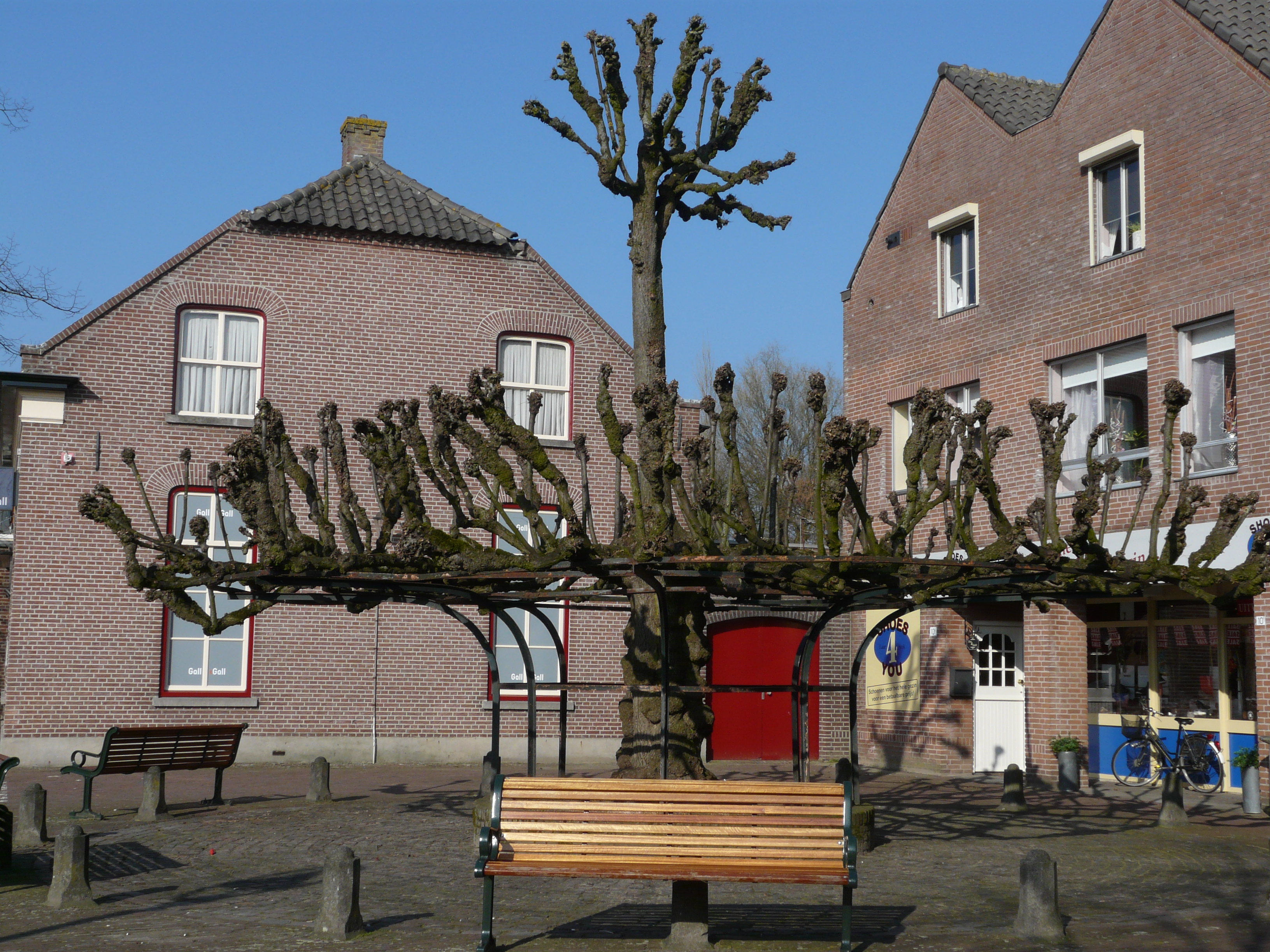 Lindeboom in centrum van Beek en Donk Heuvelplein 12